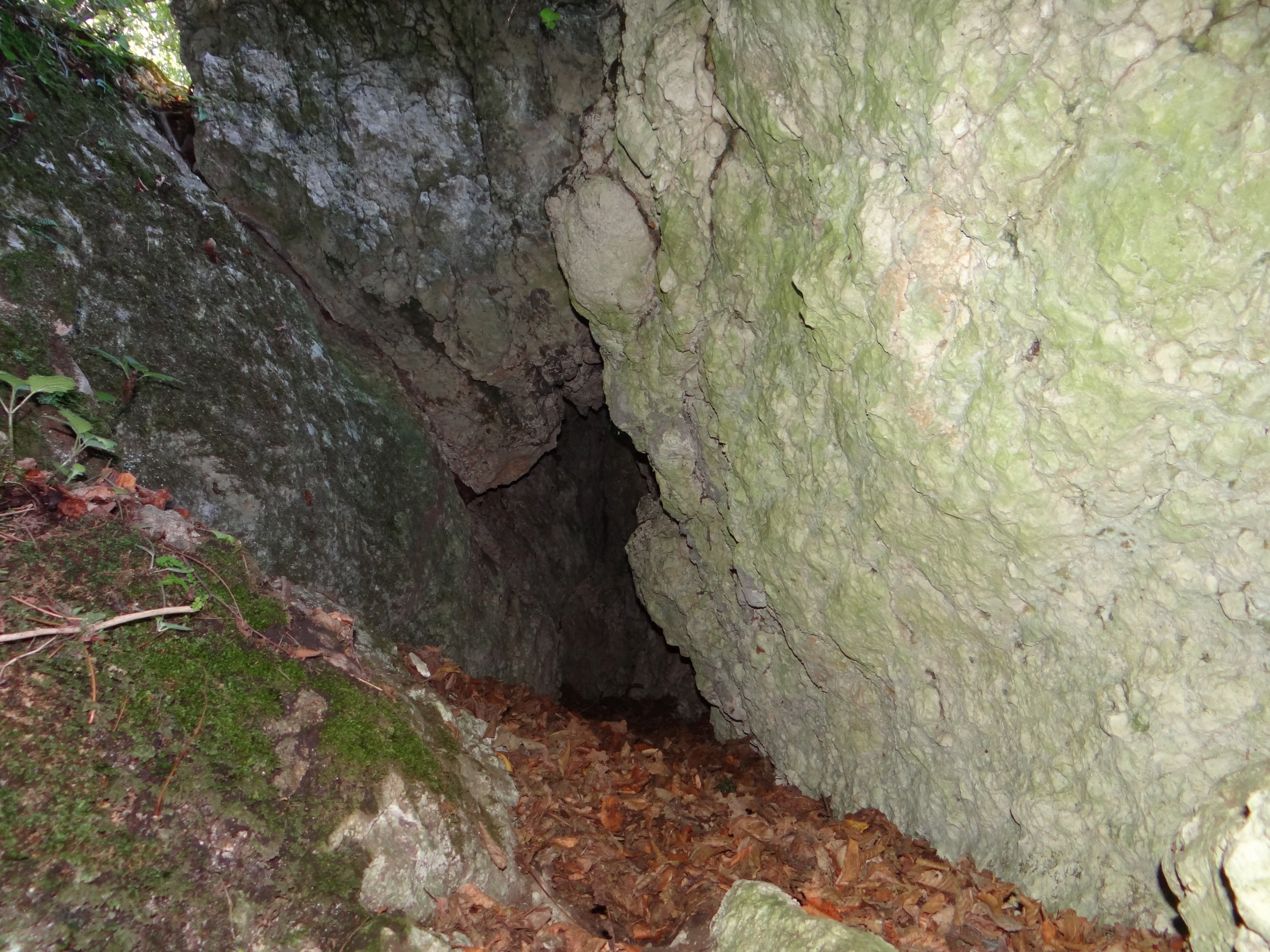 Studnia za Igłą w Skale Gaudynowskiej w dolinie Brodłówki. Otwór dolny